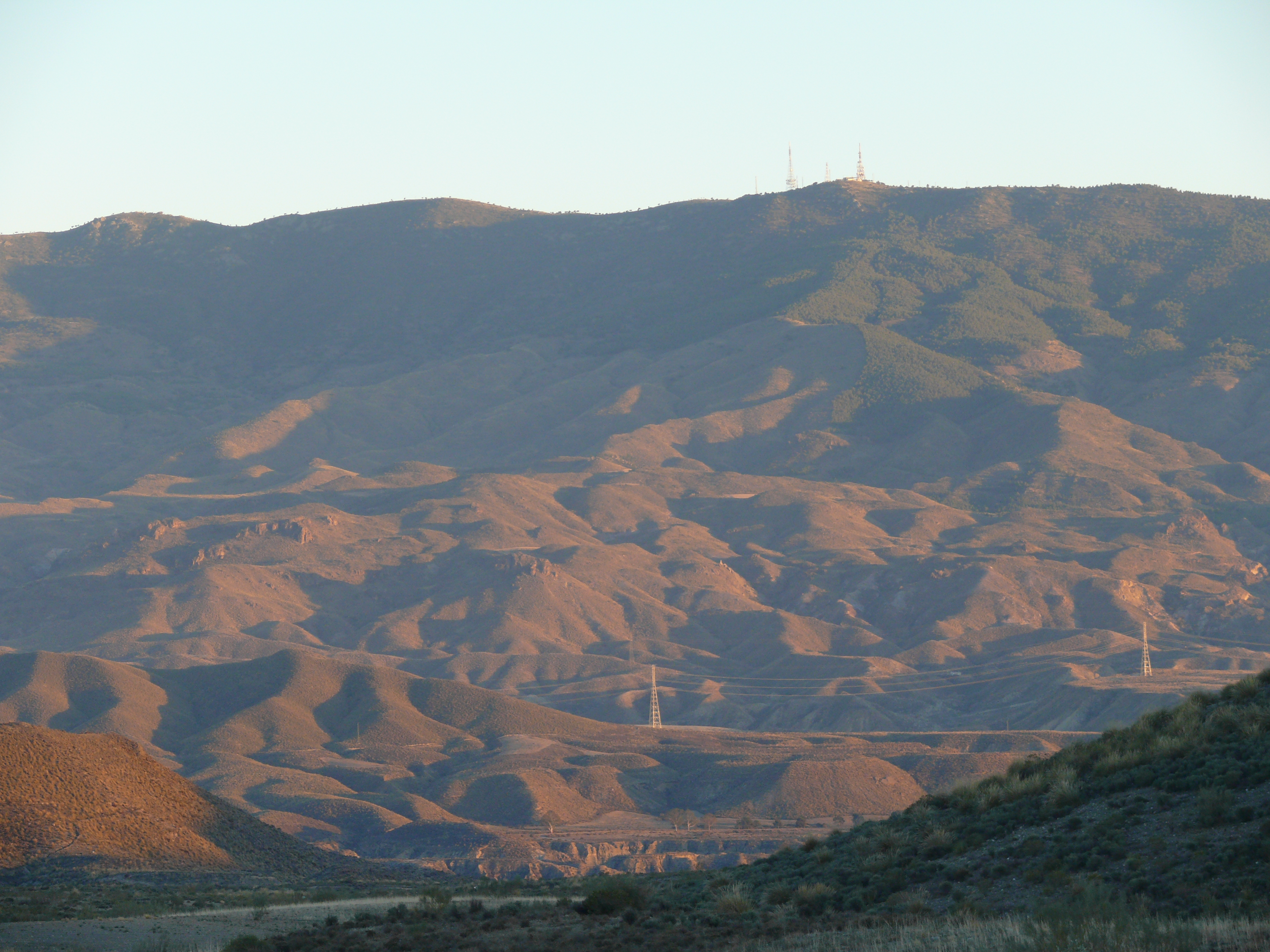 Cara norte de Sierra Alhamilla tomada desde Tabernas. Se aprecia el bosque de encinas y el pico El Puntal con sus antenas